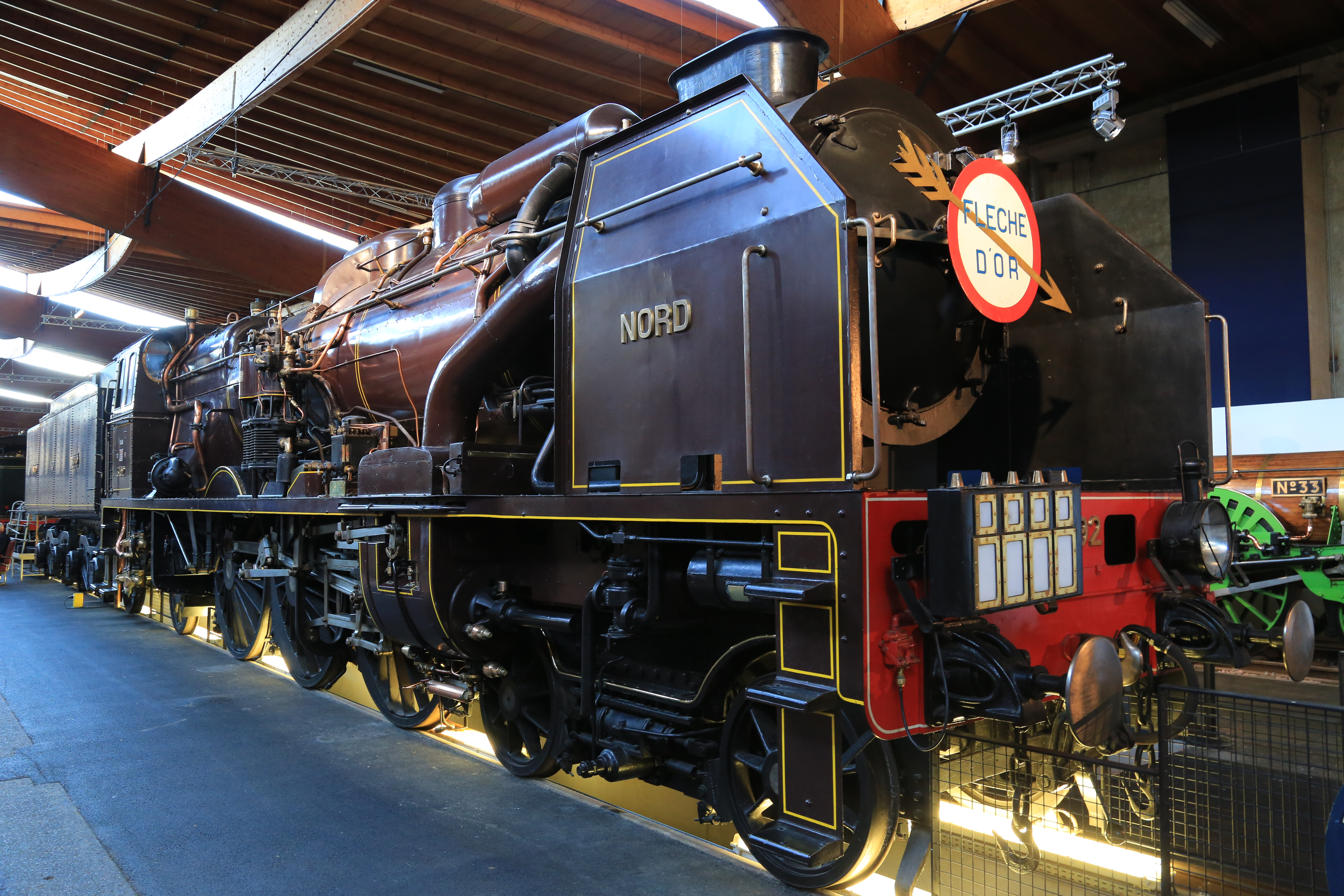 Musée du train - Mulhouse - BH5A6250